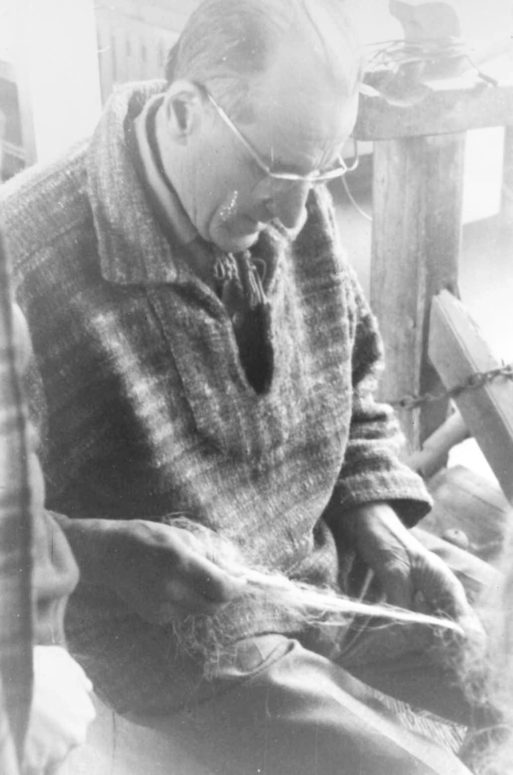 Le tisserand français Jacques Plasse (ateliers Plasse Le Caisne) qui a réalisé de nombreuses tapisseries du peintre français Alfred Manessier